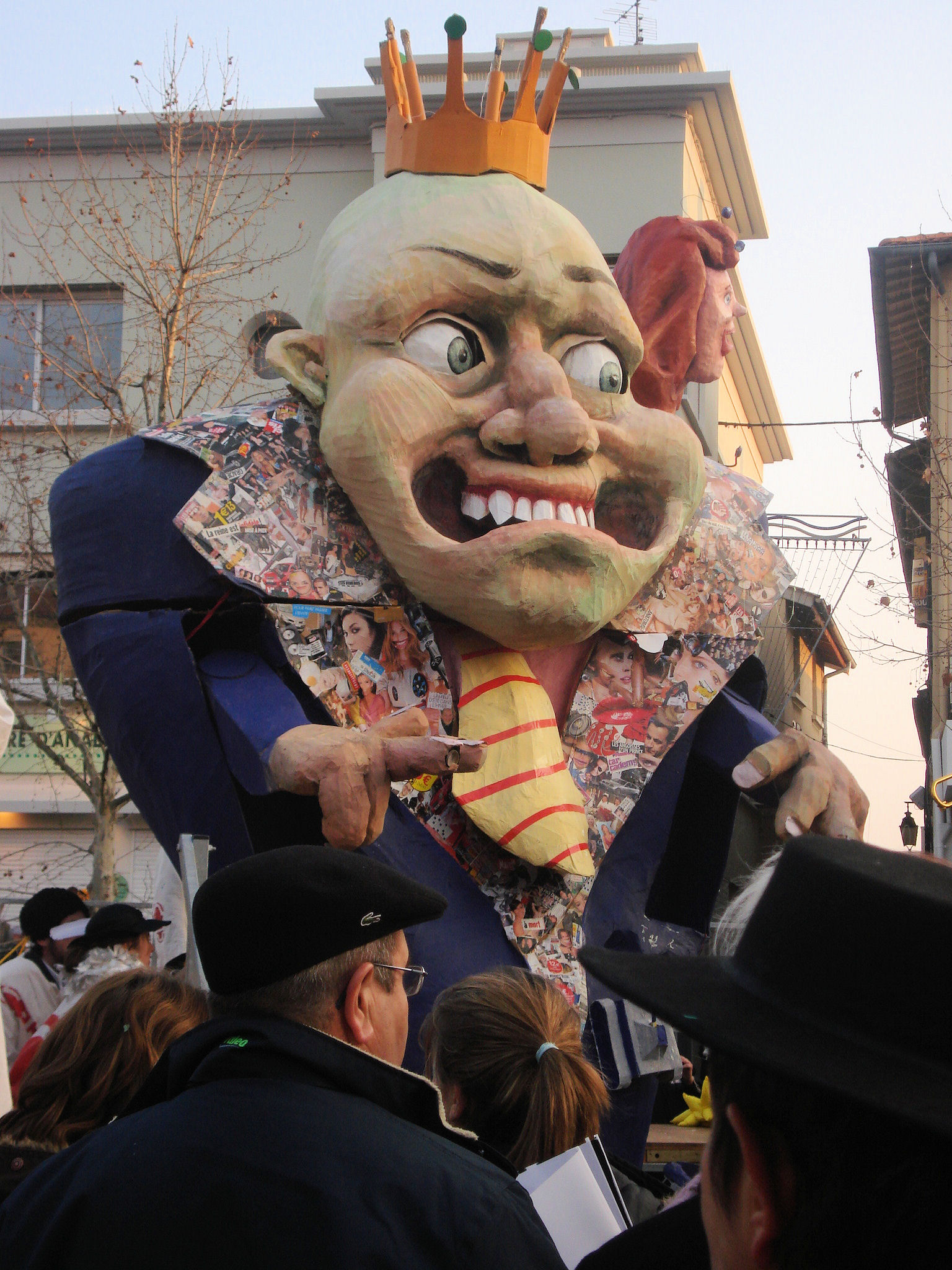 Carmentran au Carnaval de Romans 2008 dans la Drôme